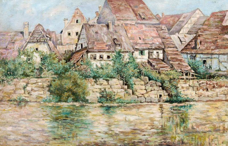 "Besigheim am Neckar", wohl 1890er Jahre, Öl auf Leinwand. 37 x 56 cm